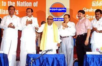 Karunanidhi with Maran, Deora, Chimbaram